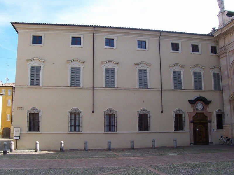 Parma - Monastero di S. Giovanni Evangelista